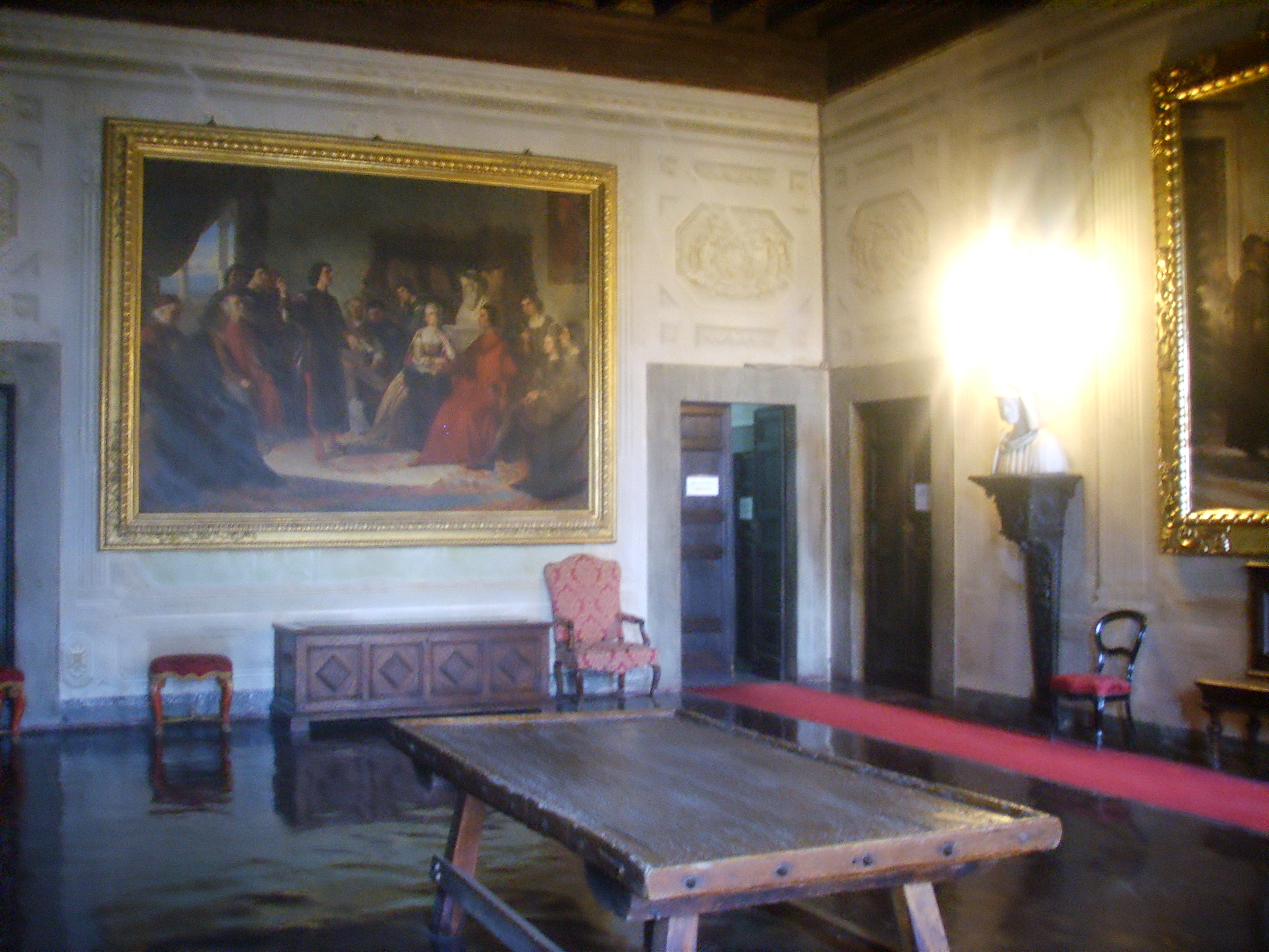 Villa di Careggi in Florence, Italy